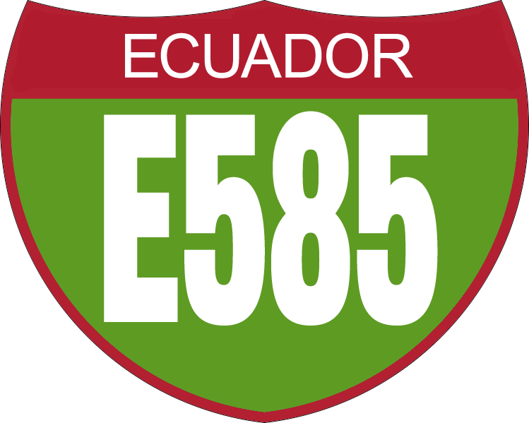 Disco de Identificación Ruta E585